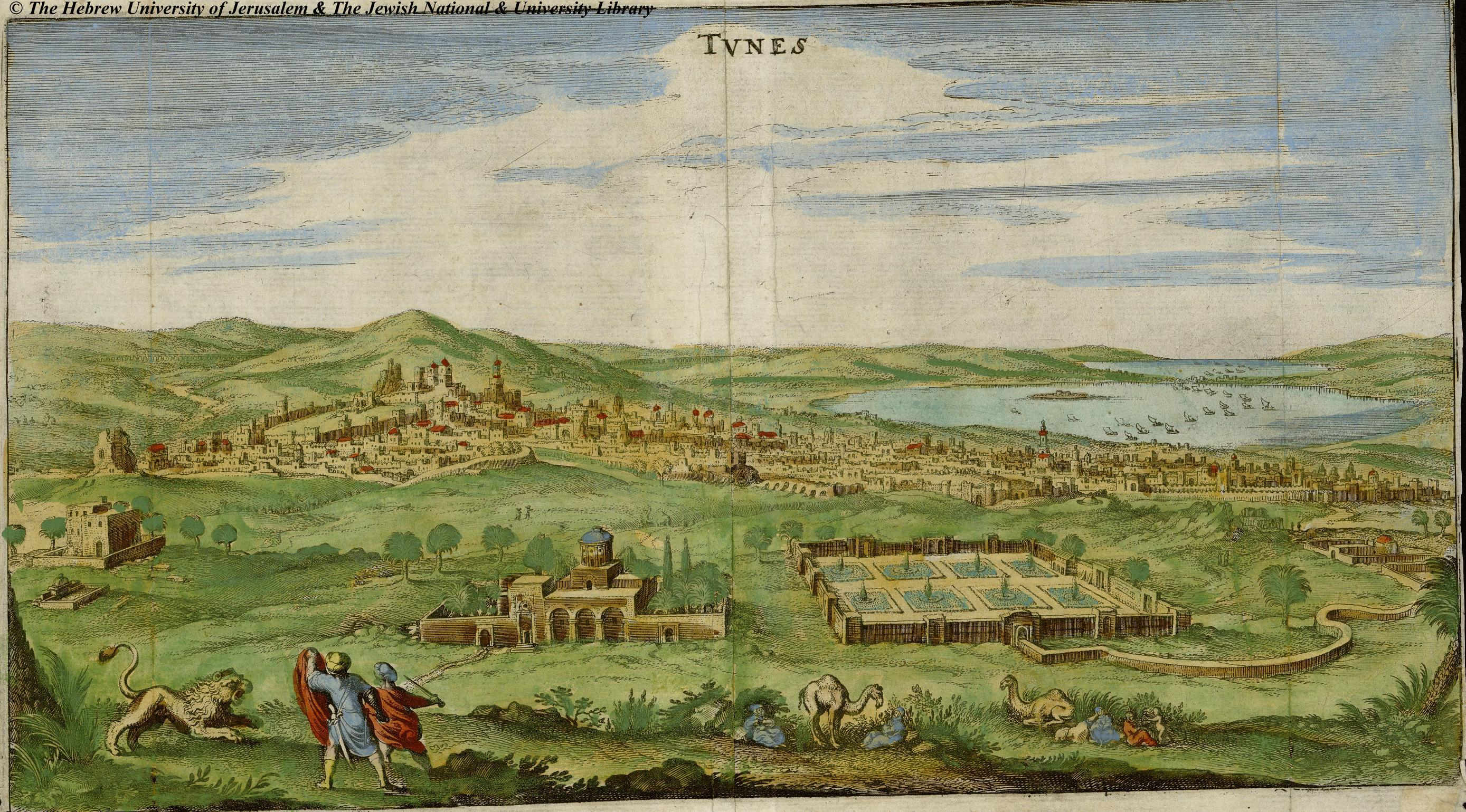 Tunis en 1646, Tunisie